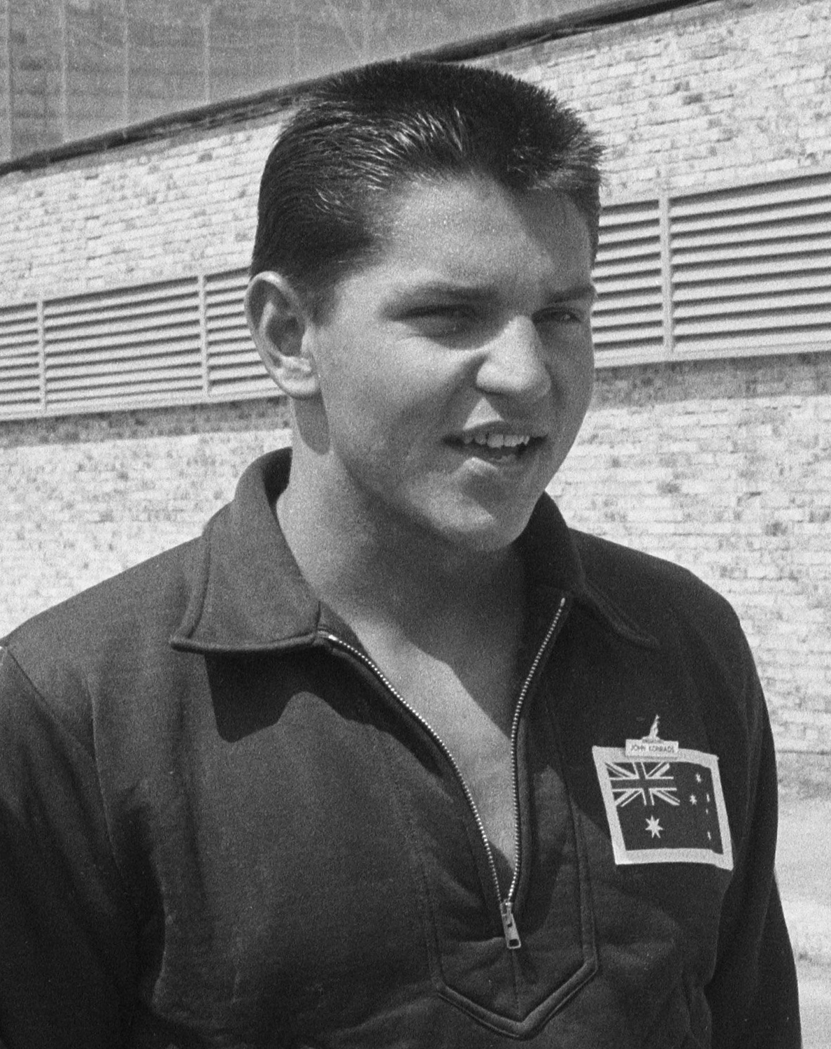 John Konrads